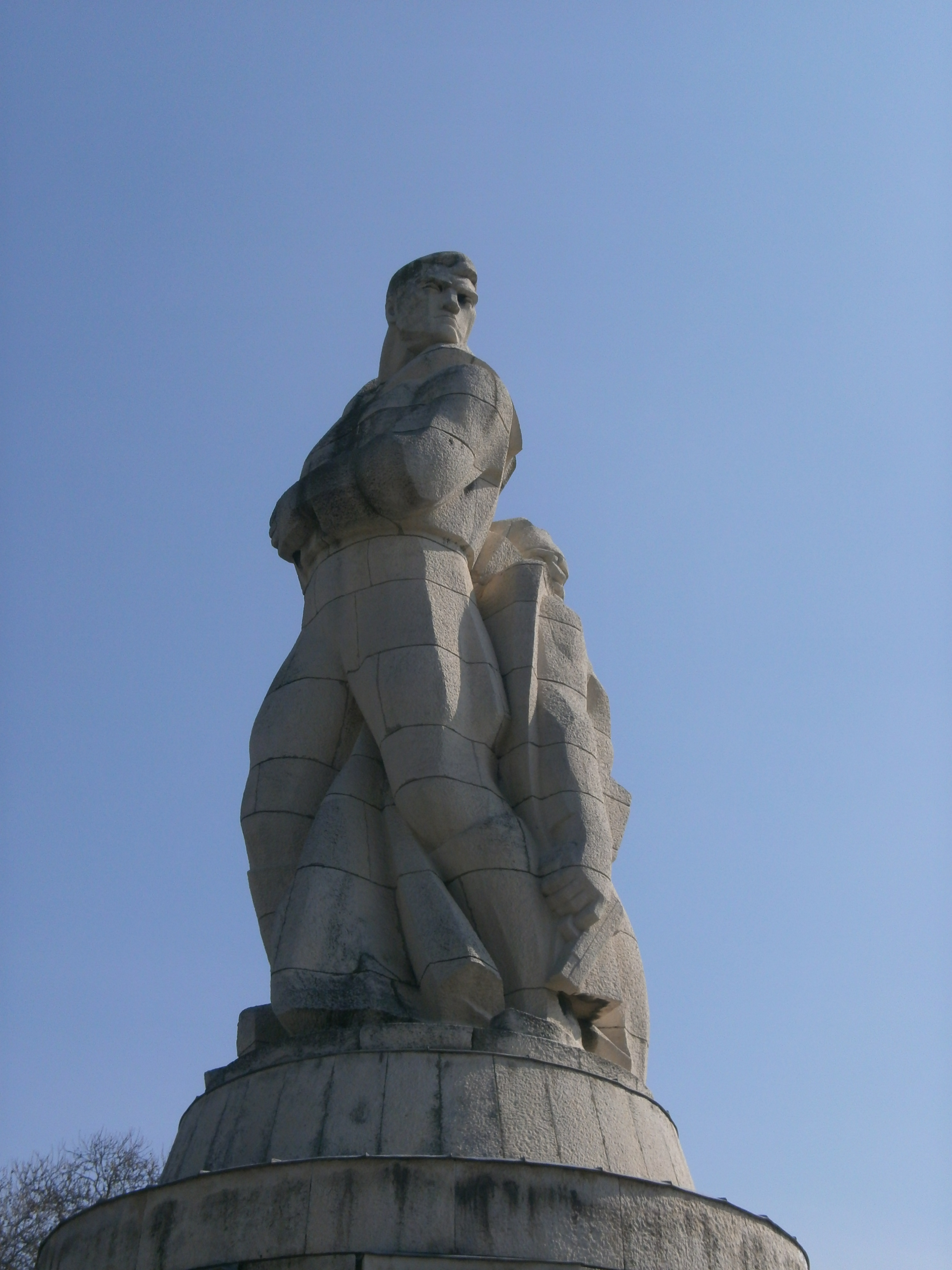 Паметникът на пантеона във Варна